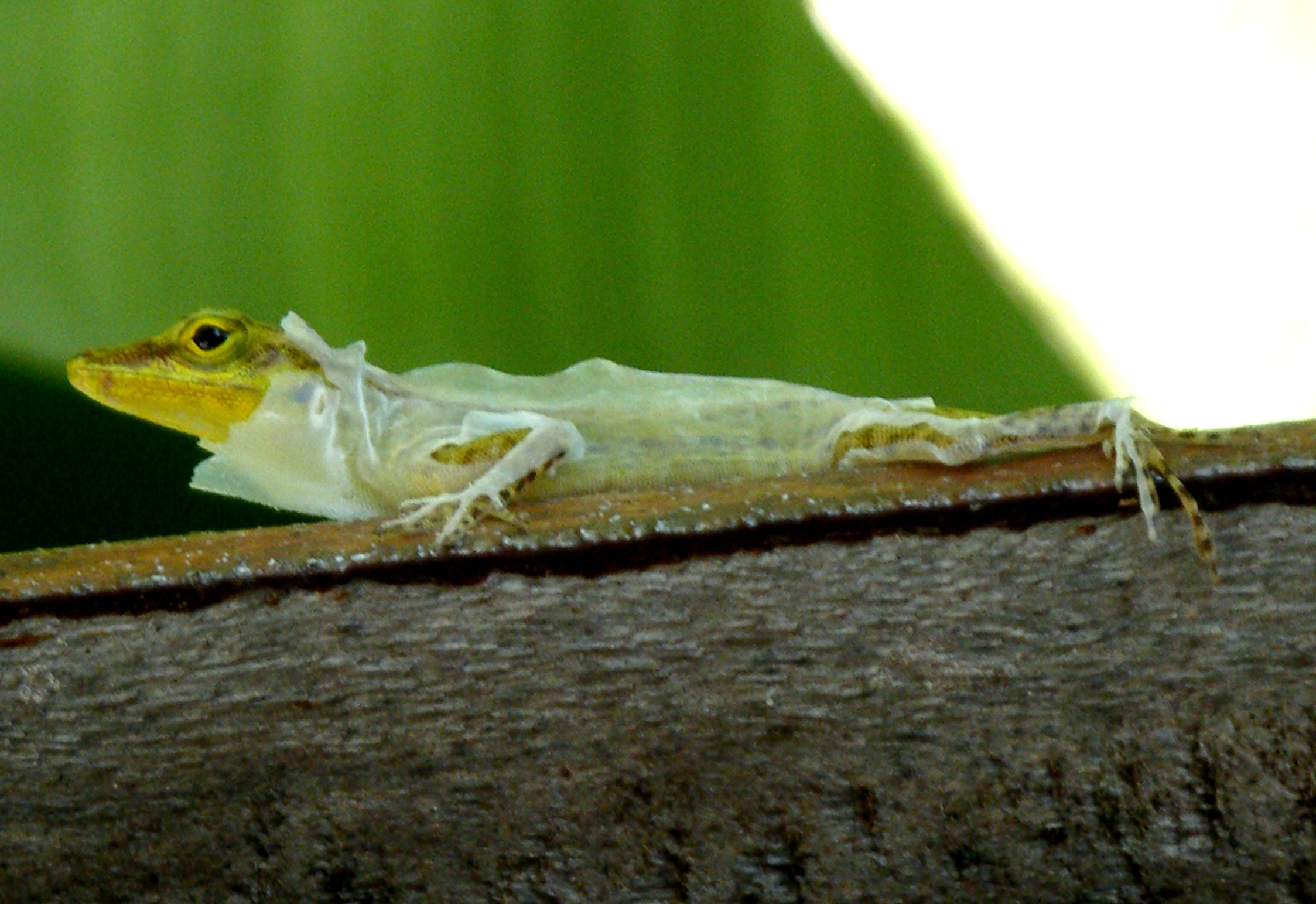 mue d'un anolis marmoratus - guadeloupe grande terre